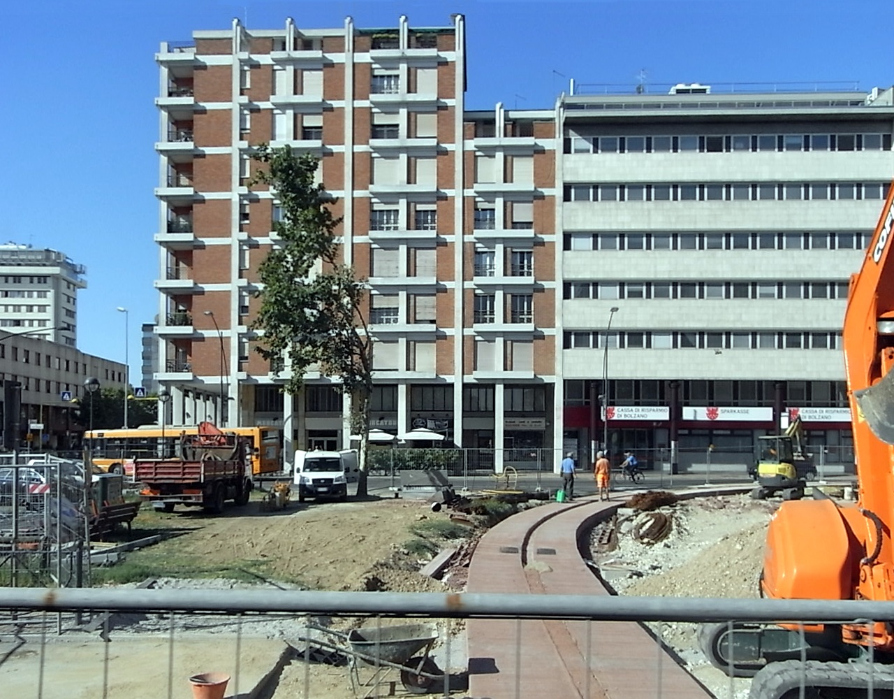 Mestre, piazza 27 Ottobre, Baustelle der Straßenbahn.